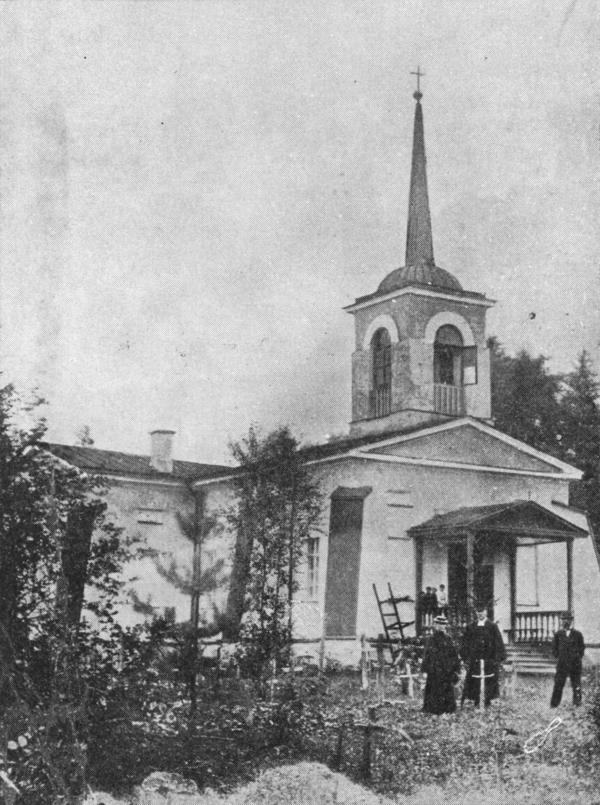 Кирха прихода Серепетта. 1911 г.